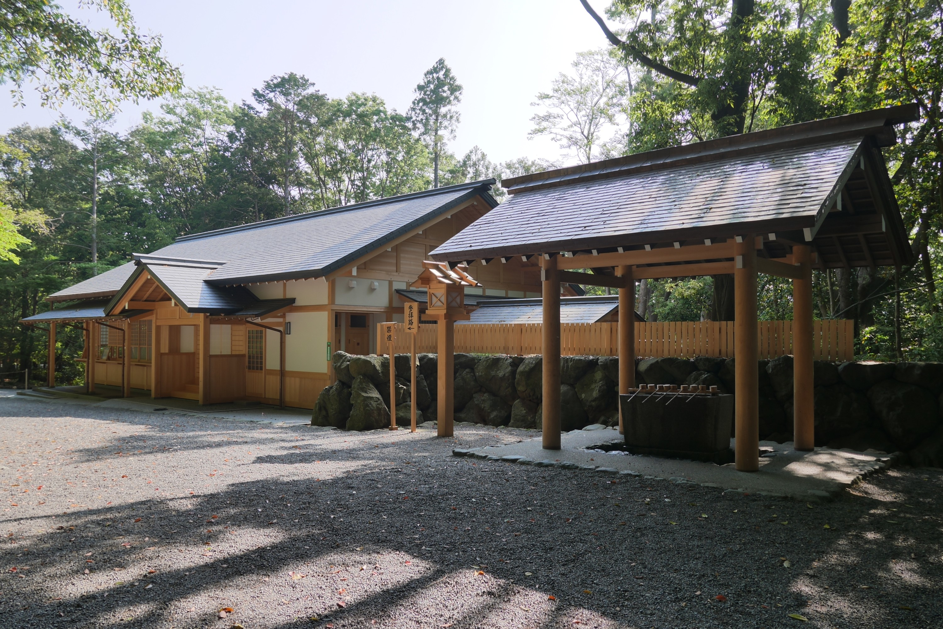 日本の三重県伊勢市にある皇大神宮別宮の月讀宮の手水舍と宿衛屋。